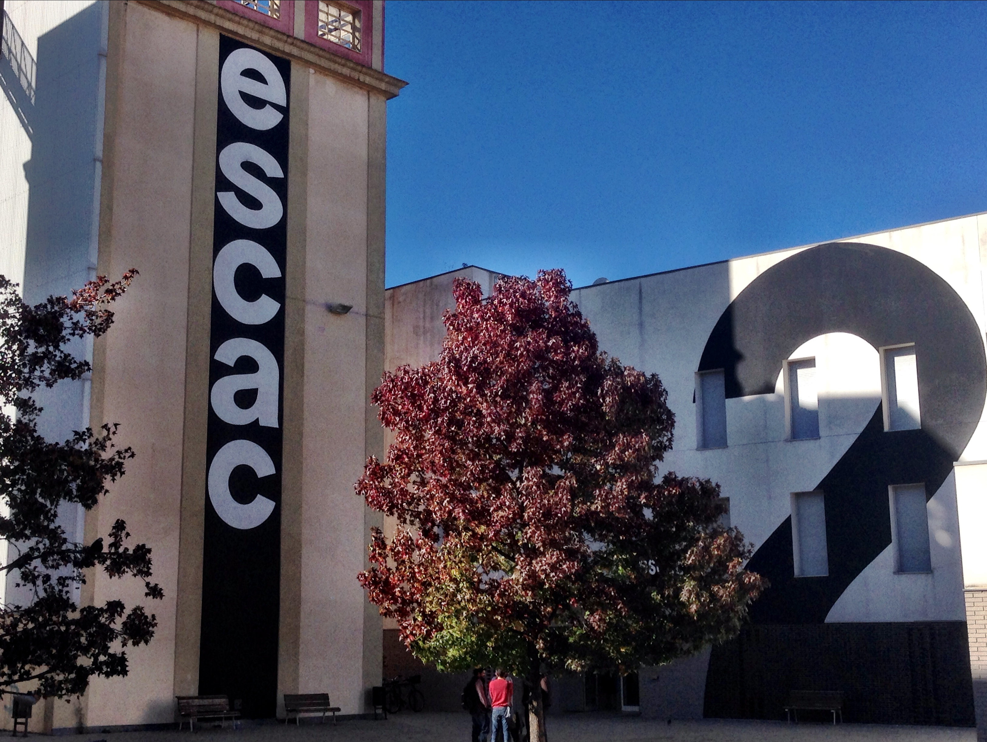 Visión del edificio 2 del complejo de la ESCAC en Plaça de la Farinera, Terrassa